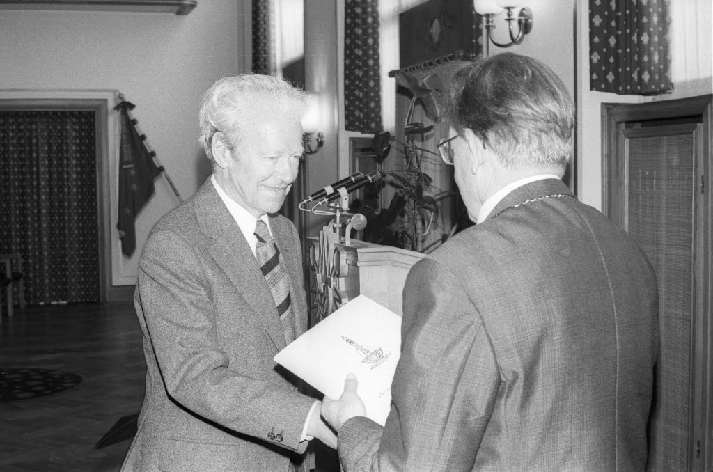 im Ratssaal des Rathauses. Der Theologe und Philosoph Prof. Dr. Knud Ejler Loegstrup (links) erhält vom Präsidenten der Christian-Albrechts-Universität (CAU) Prof. Dr. Gerd Griesser (rechts) die Verleihungsurkunde.